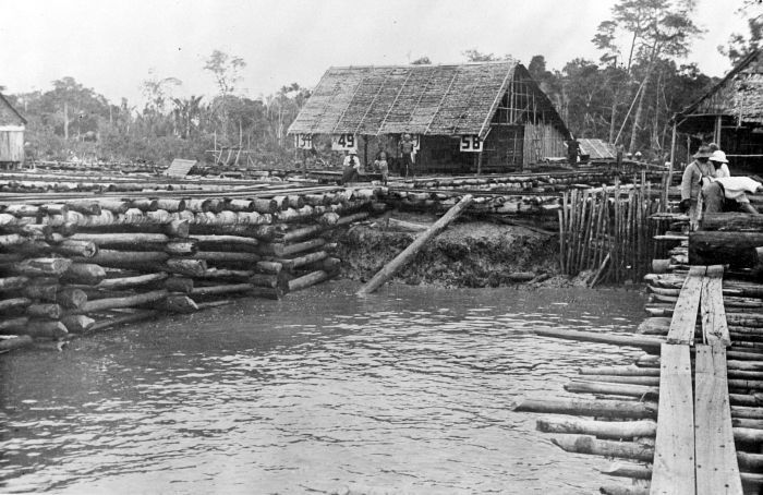 Repronegatief. Steiger op eiland Mendol, Bengkalis Sumatra's O.K. 1930.